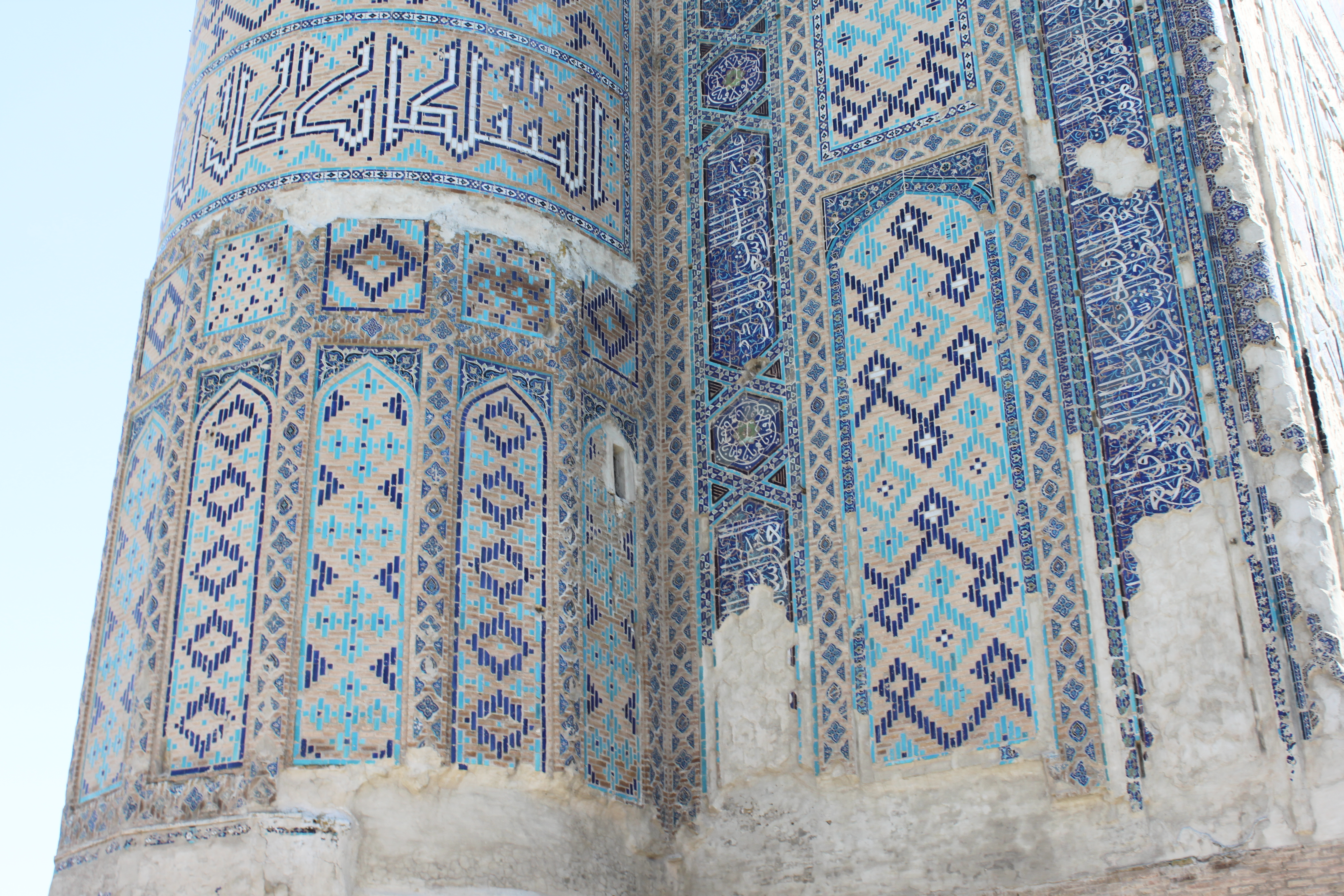 Ak Sarai à Shahrisabz - détail